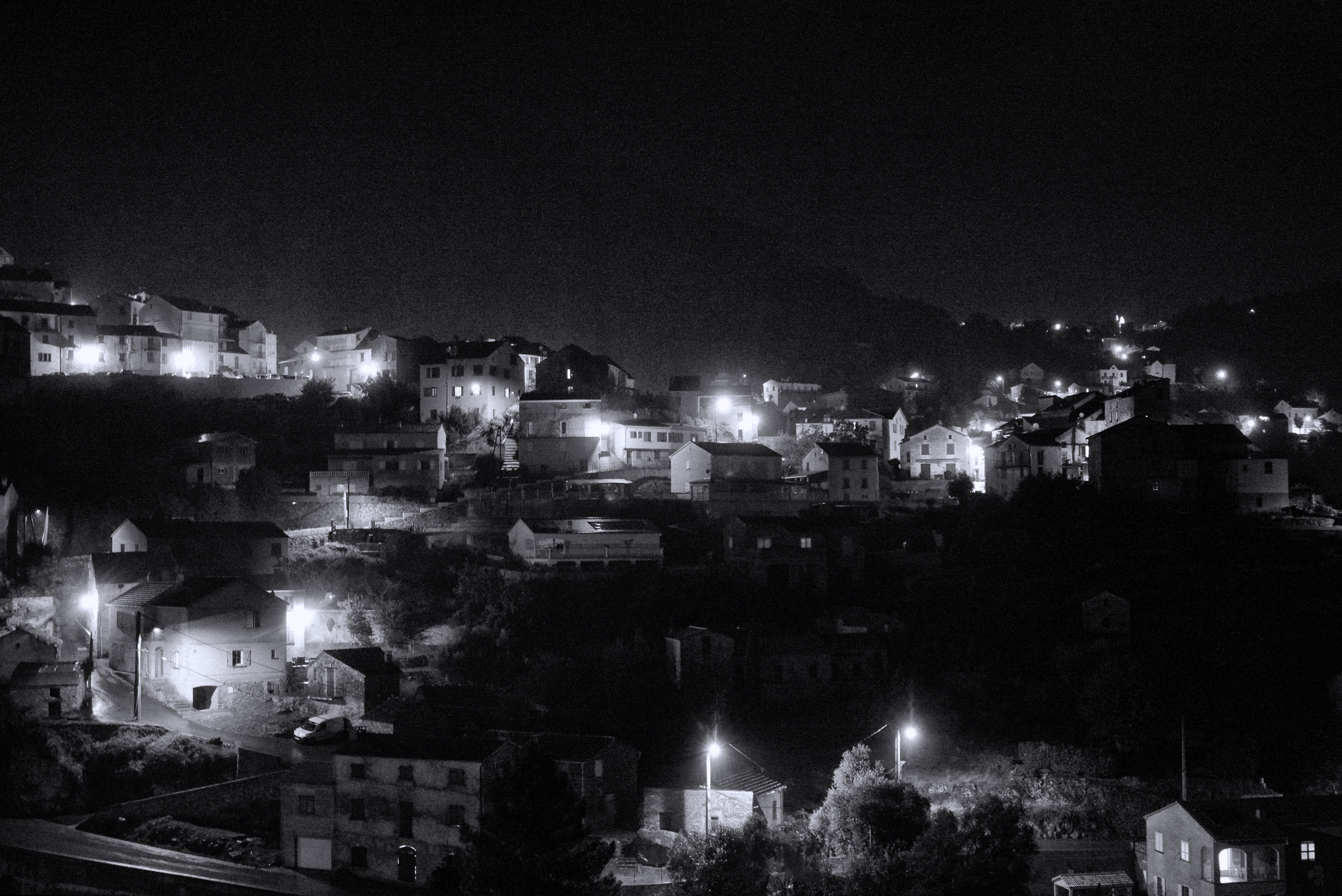 Venaco, Centre (Corse) - Vue du village la nuit